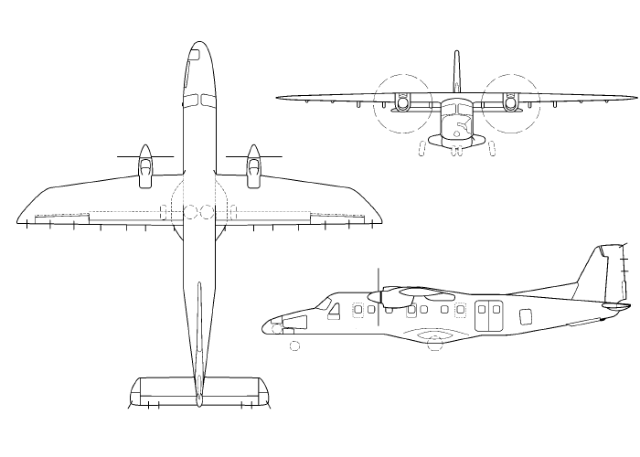 3-view drawing of Dornier 228